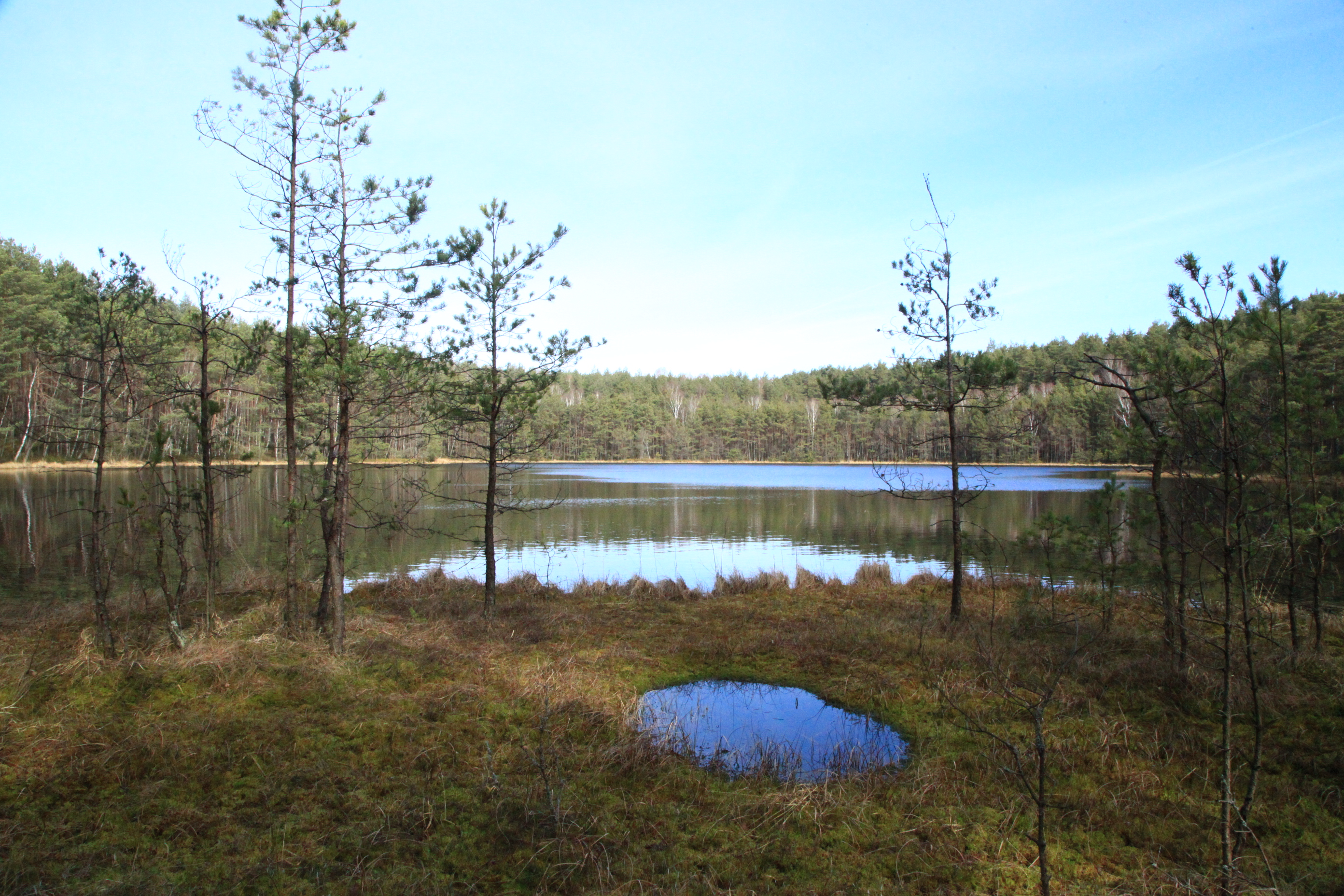 Dystroficzne jezioro Mały Smólsk otoczone jest płem mszarnym